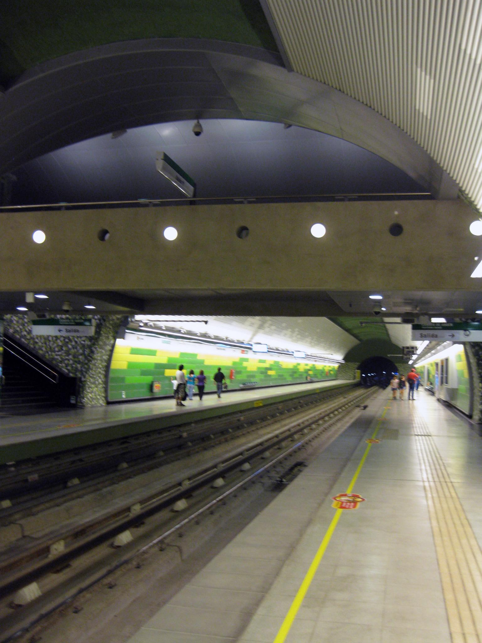 Extensión Poniente Línea 5: Febrero 2011